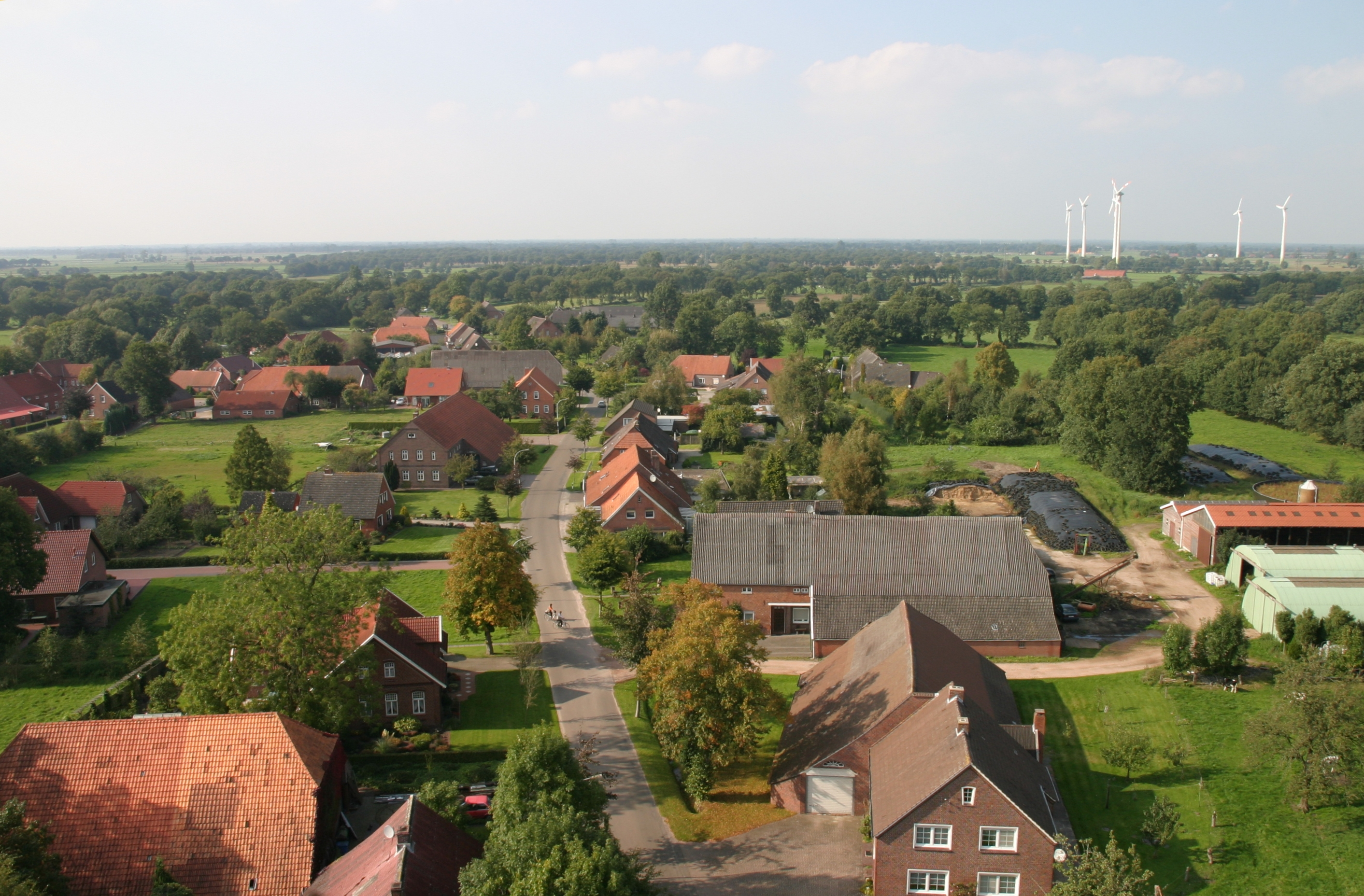 Blick vom Kirchturm auf die Dorfstraße in Bagband